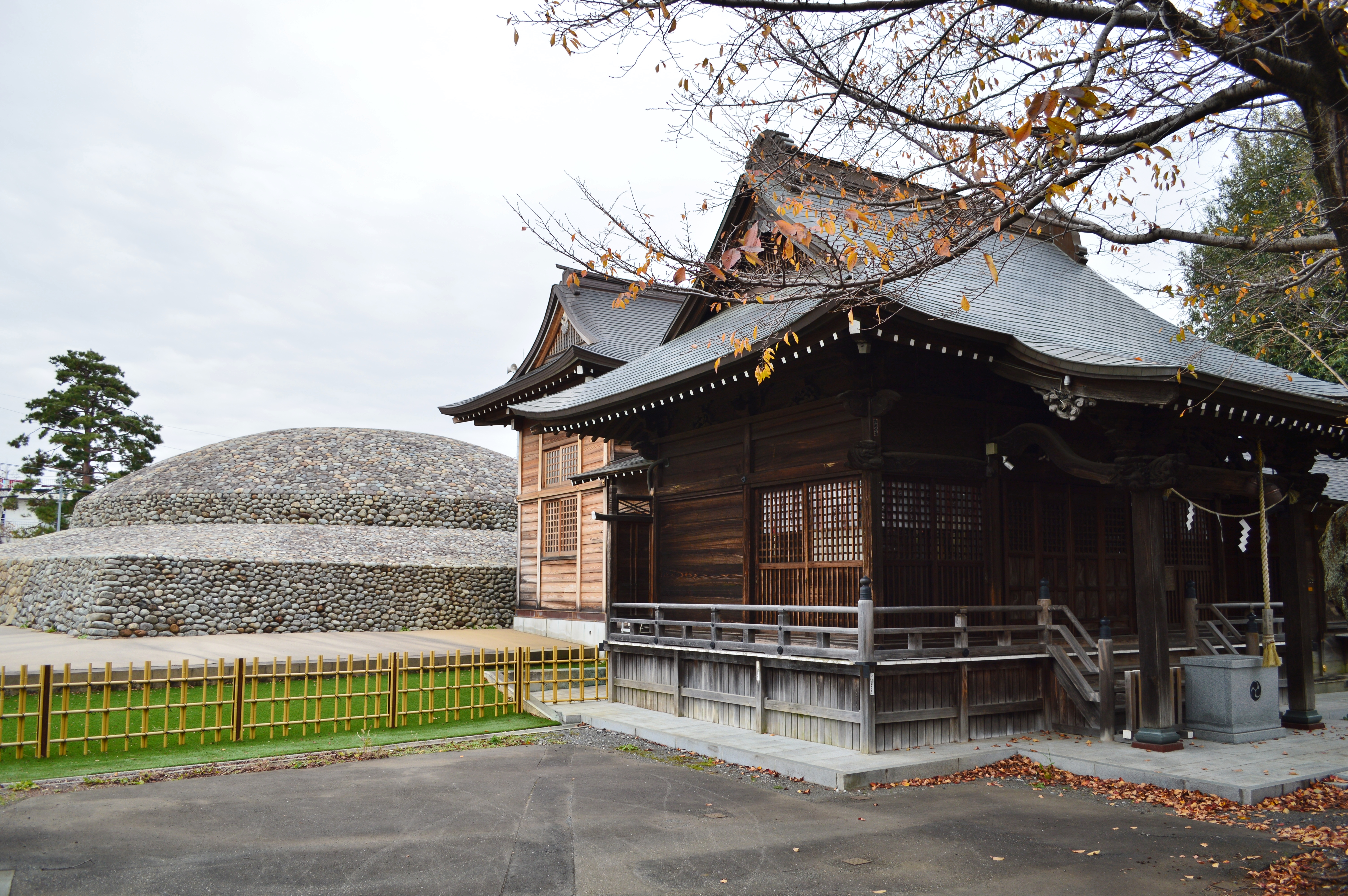 熊野神社・武蔵府中熊野神社古墳